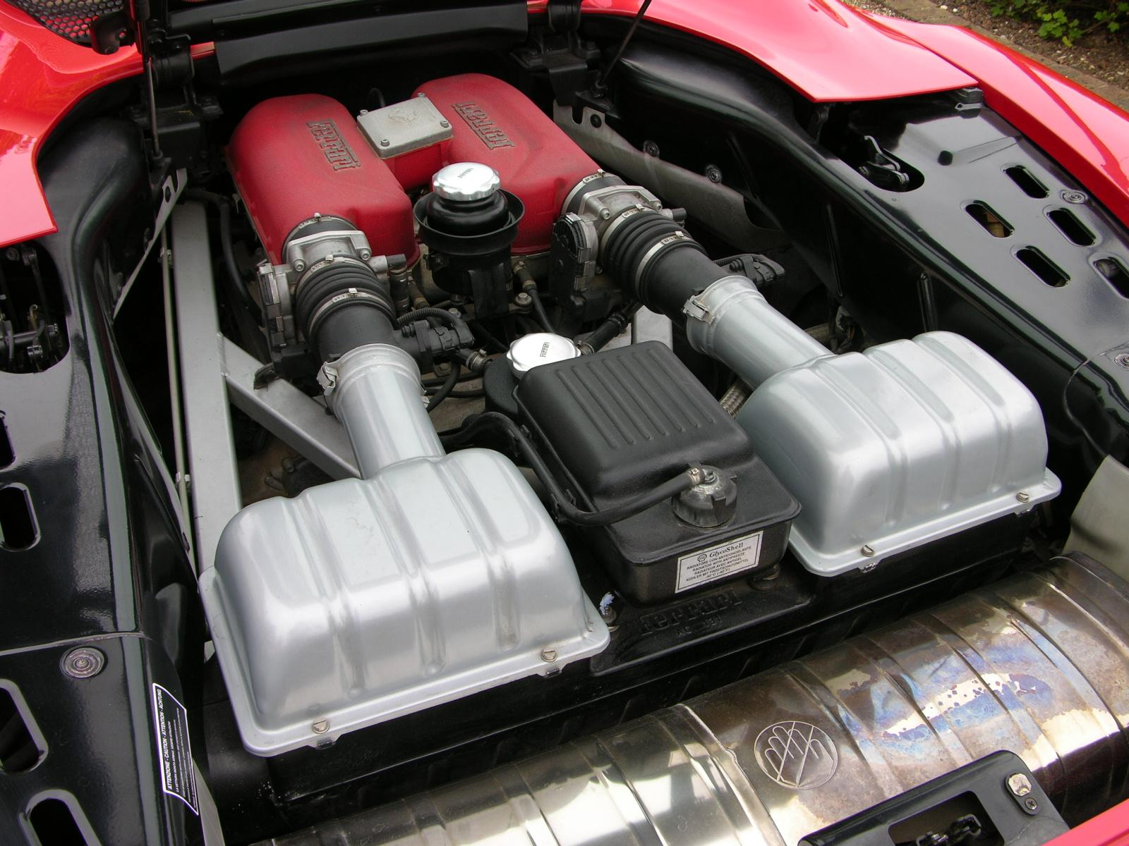 2004 Ferrari 360 Spider F1